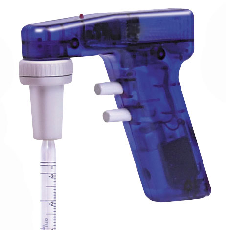 Pipettierhilfe Pipetboy